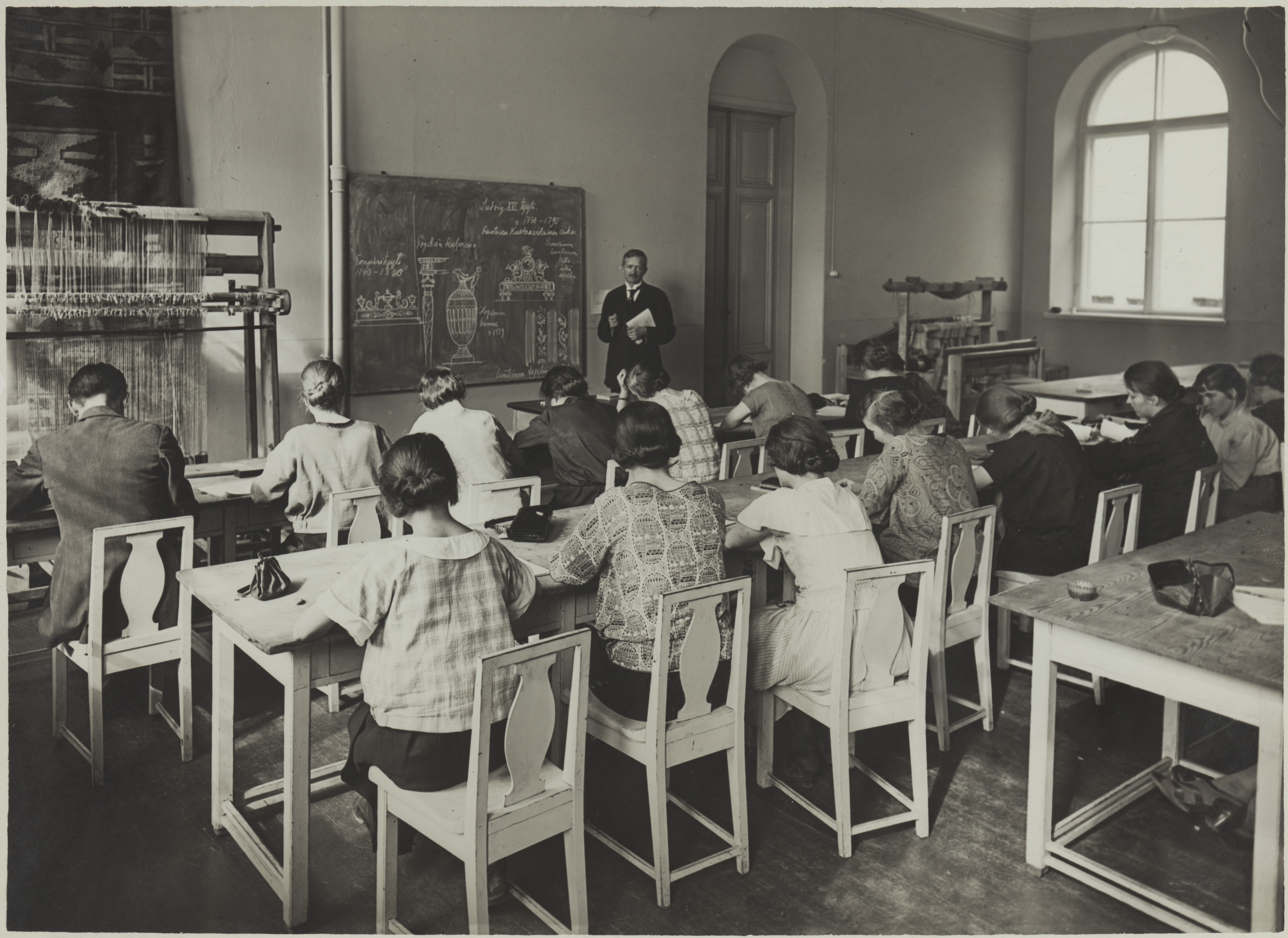 Tyyliopin opetustilanne, 1920-luku. Opettaja Edward Elenius. Taideteollisuuskeskuskoulun opetustilanteita. Aalto-yliopisto / Aalto University Tiedätkö lisää tästä kuvasta? Jätä kommentti tai ota yhteyttä sähköpostitse: Lisätietoja kuvakokoelmista / more information